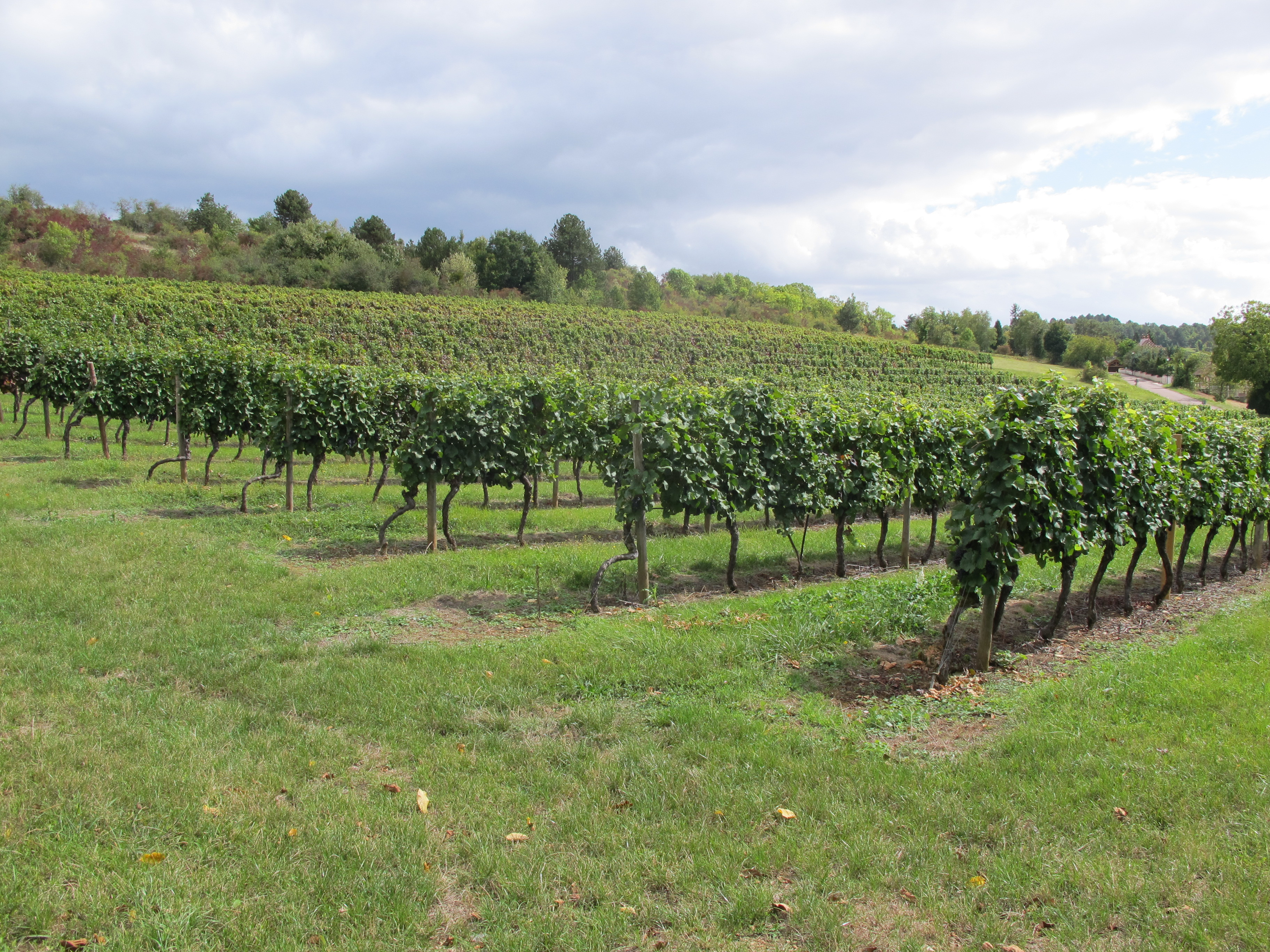 Échevronne